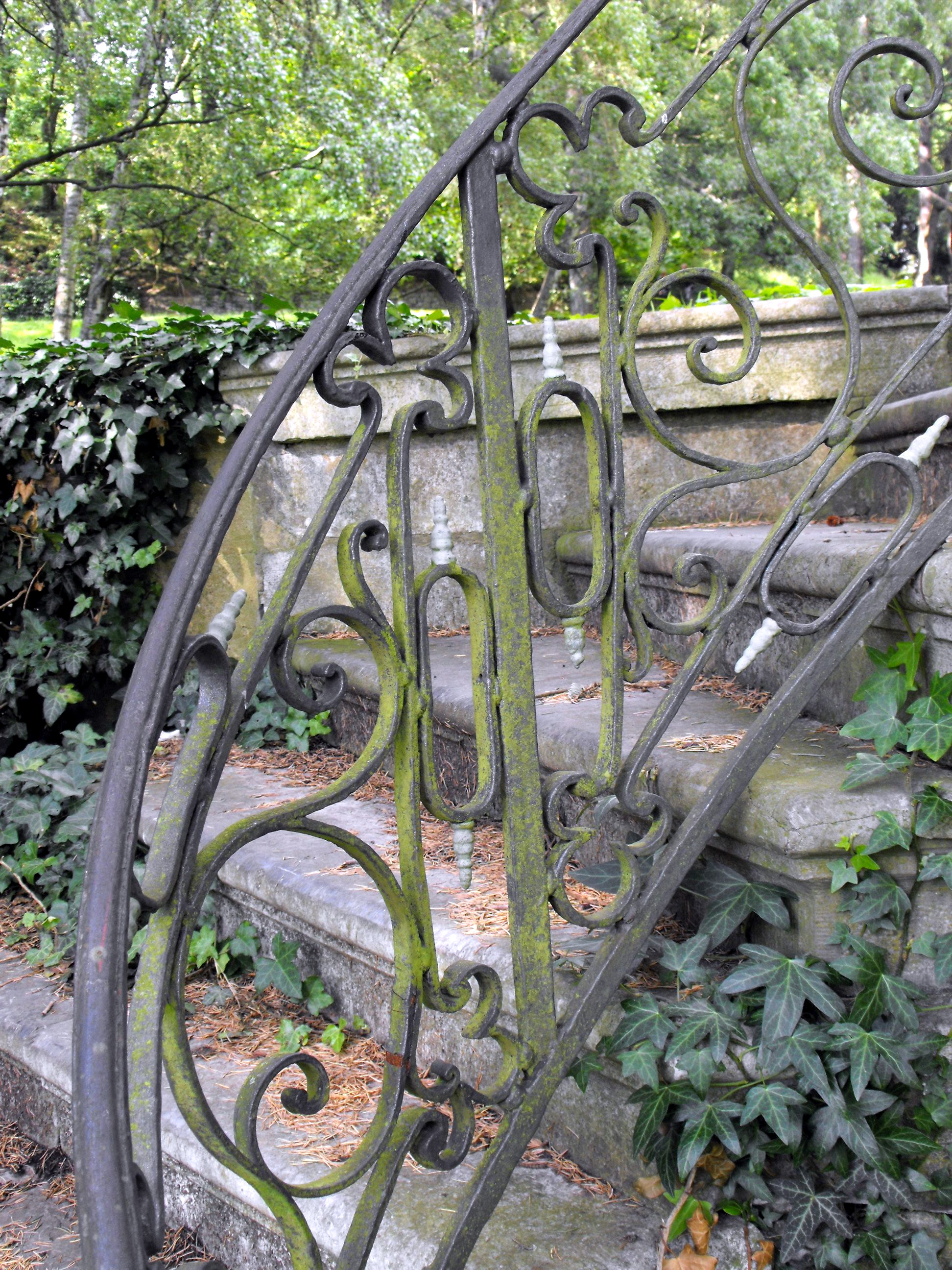 schmiedeeiserner Handlauf der Guaita'schen Treppenanlage im Kurgarten Aachen (Detail)